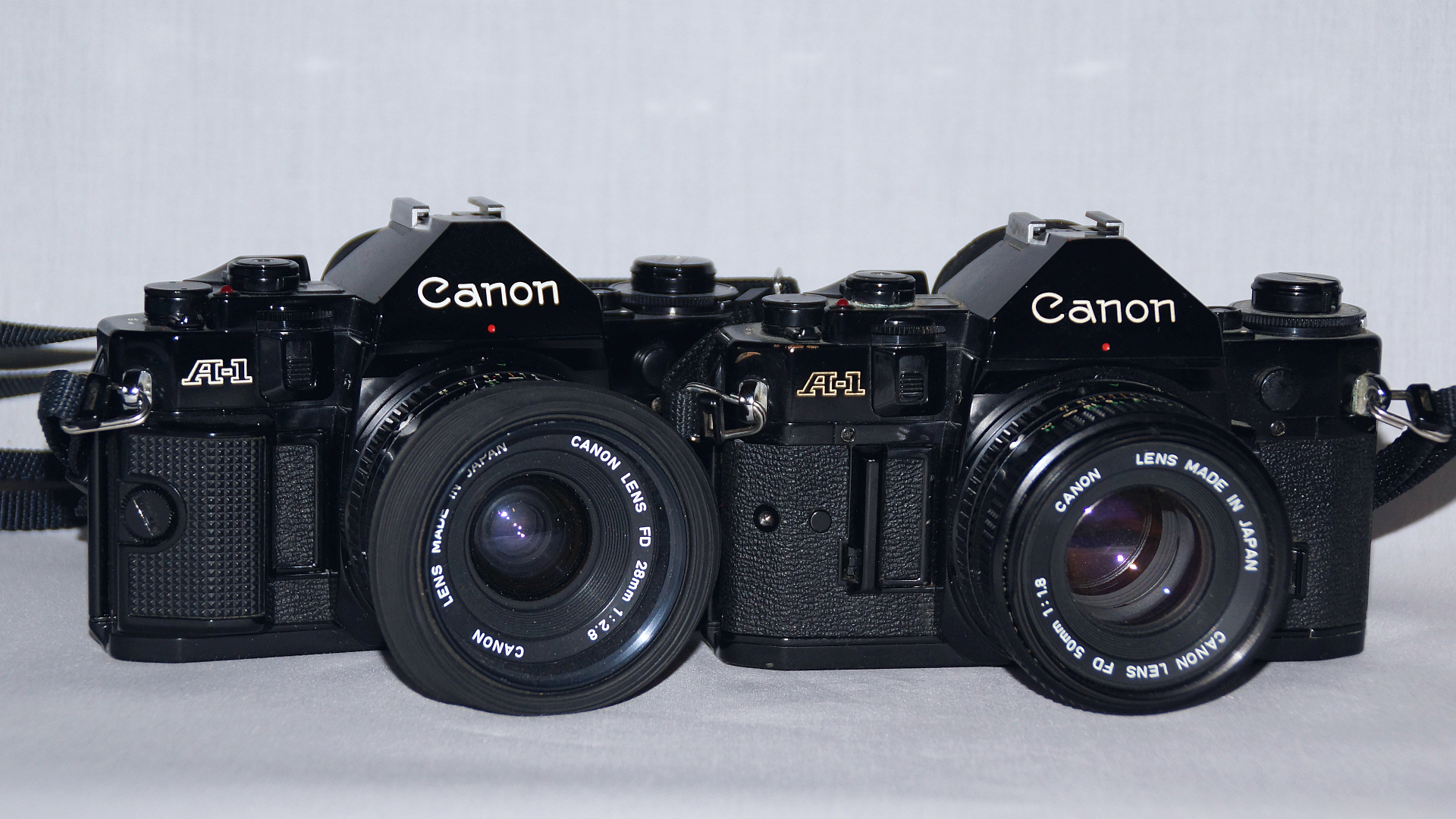 Canon A-1 mit Canon FD-lens 1:2.8/28mm und A-1 mit Canon FD-lens 1:1.8/50mm - Foto 2019 Wolfgang Pehlemann DSC04868